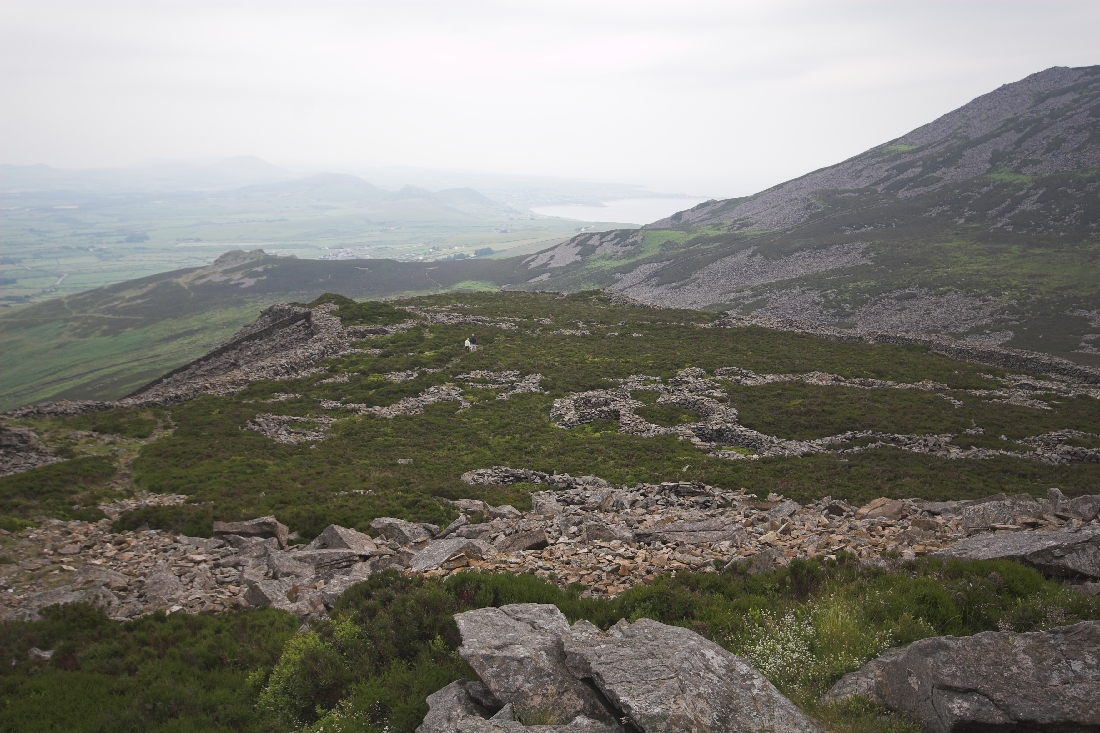 Tre’r Ceyri, Überblick über das Hillfort